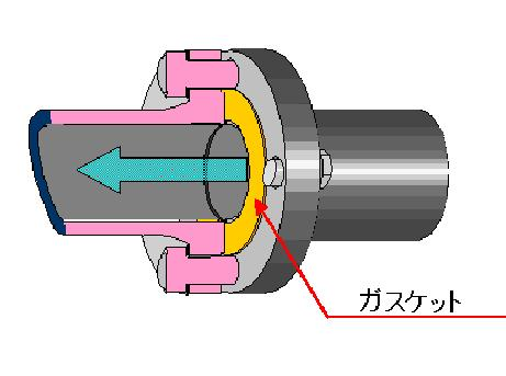 Gasket